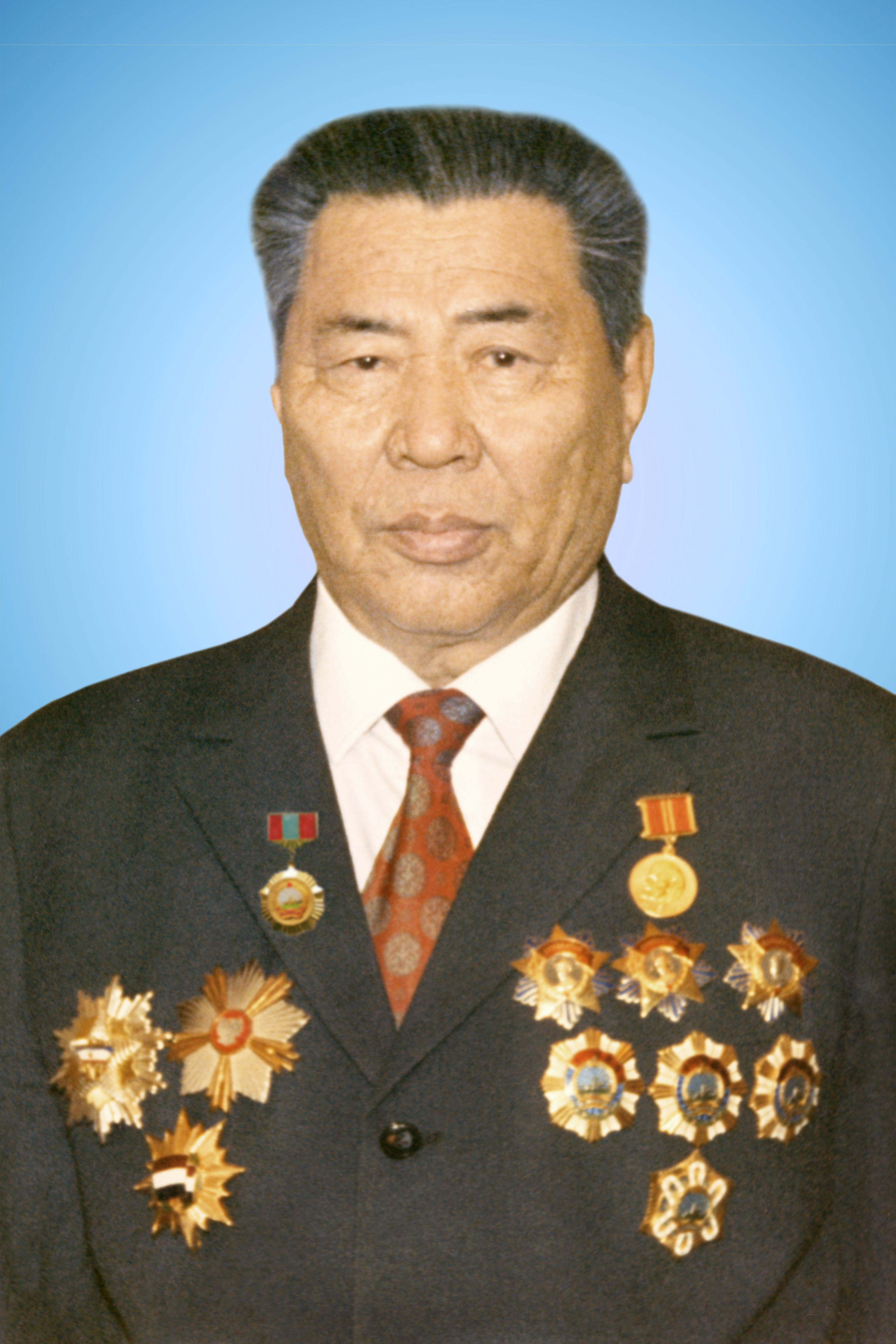 Монгол: Түмэнбаярын Рагчаа